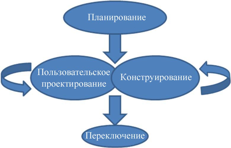 Модель быстрая разработка приложений